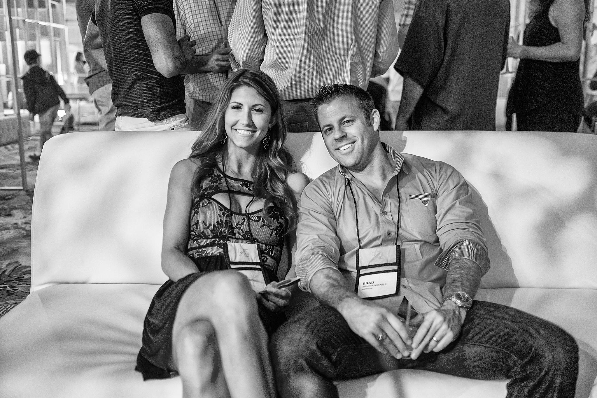 brad hunstable